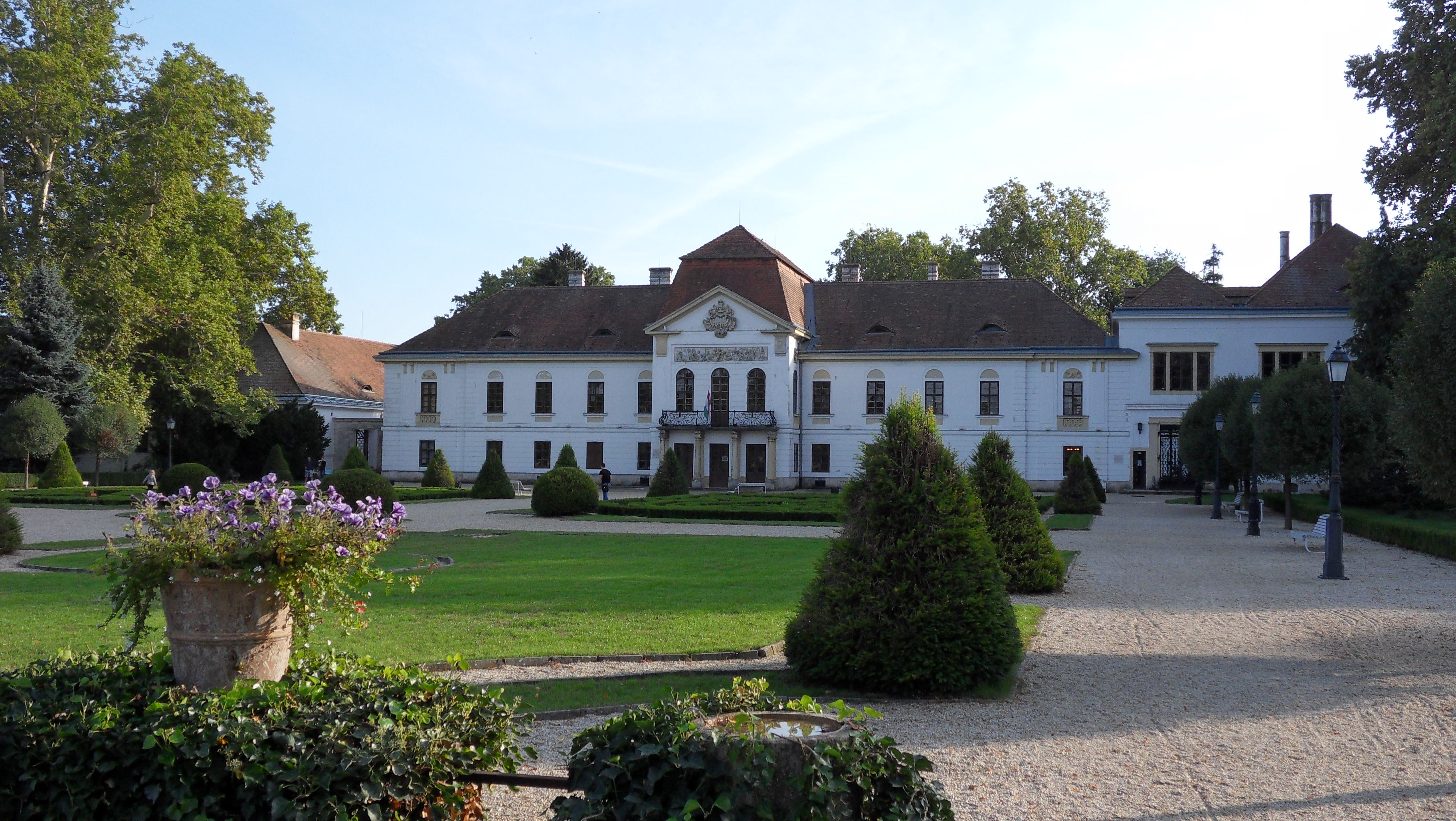 Széchenyi-kastély, Nagycenk – Széchenyi Emlékmúzeum This is a photo of a monument in Hungary. Identifier: 18191